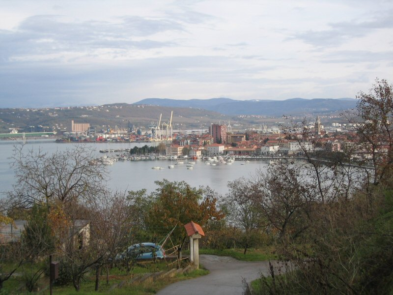 Koper/Capodistria, perspektivo de Semedela/Semedella